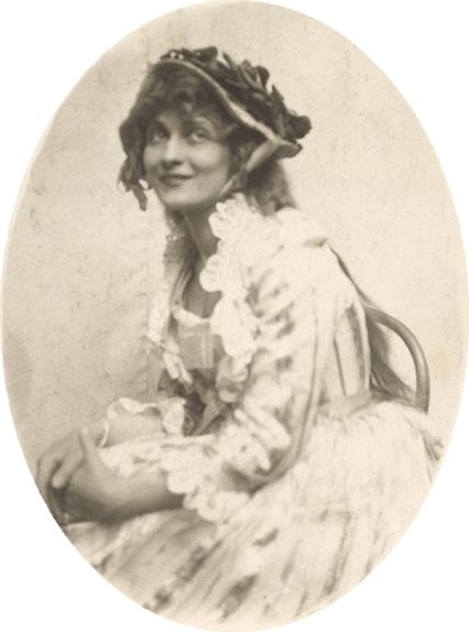 Jarmila Kronbauerová (1893 - 1968) v roli Meme, Česká herečka, členka ND v Praze.